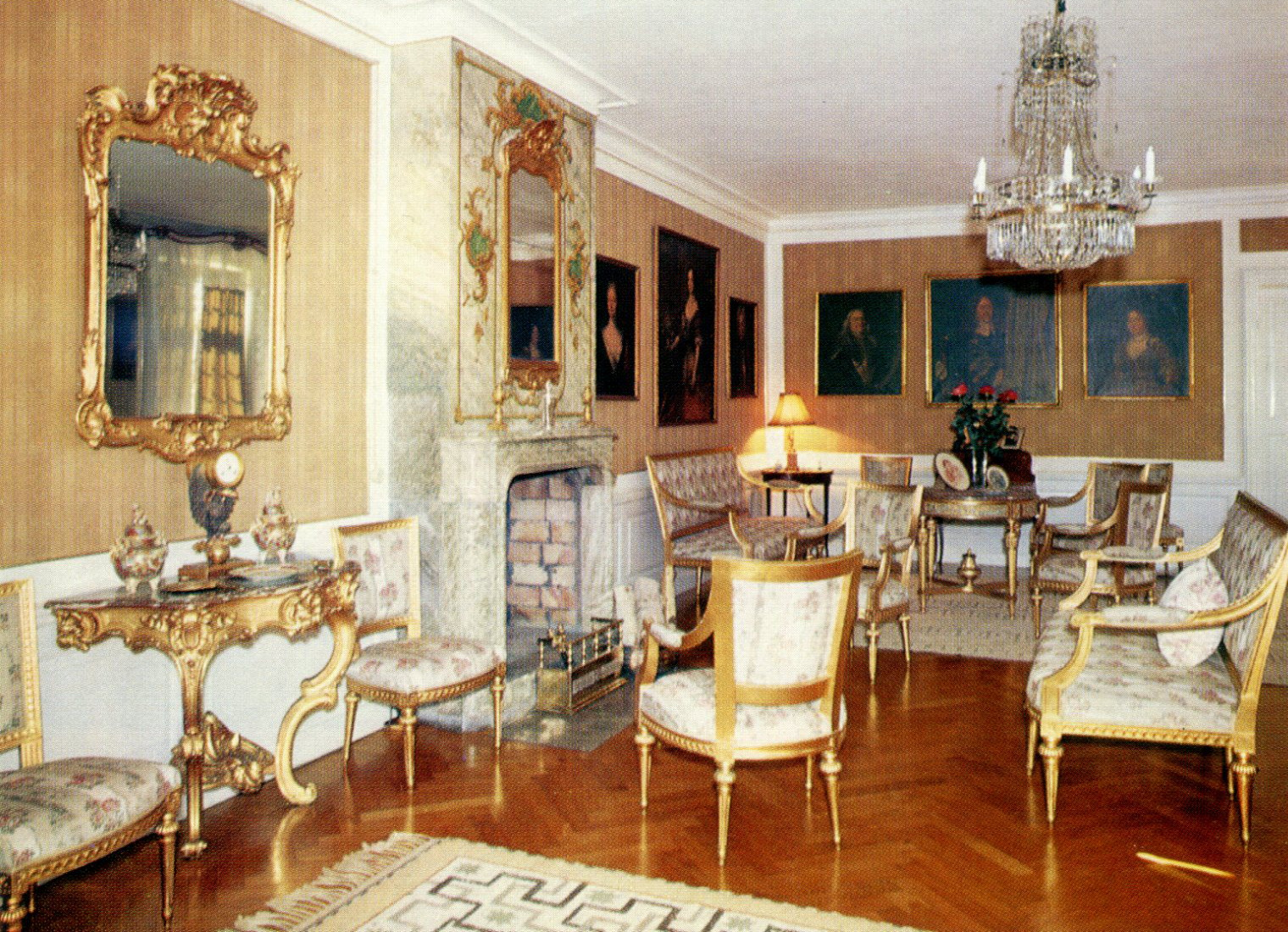 Säby herrgård, Aspö socken, interiör, salong